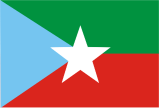 Bandera del FLS-Abo Imagen realizada por J. Ollé Véase también: Wikipedia:Autorizaciones/Banderas de Jaume Ollé Categoría:Banderas (imagen)